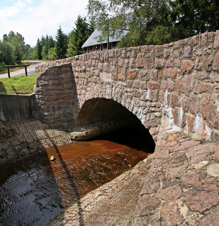 Blick auf die Schinderbrücke üer die Rote Weißeritz in Schellerhau. Über die Brücke führte einst die Zinnstraße von Altenberg nach Freiberg. Die alte Holzbrücke wurde 1789/90 durch eine Steinbrücke aus Porphyr ersetzt. Der Name leitete sich von einer nahen Abdeckerei ab. Die Brücke ist heute nur noch für Fußgänger benutzbar, der Straßenverkehr wird über einen benachbarten Neubau geleitet.